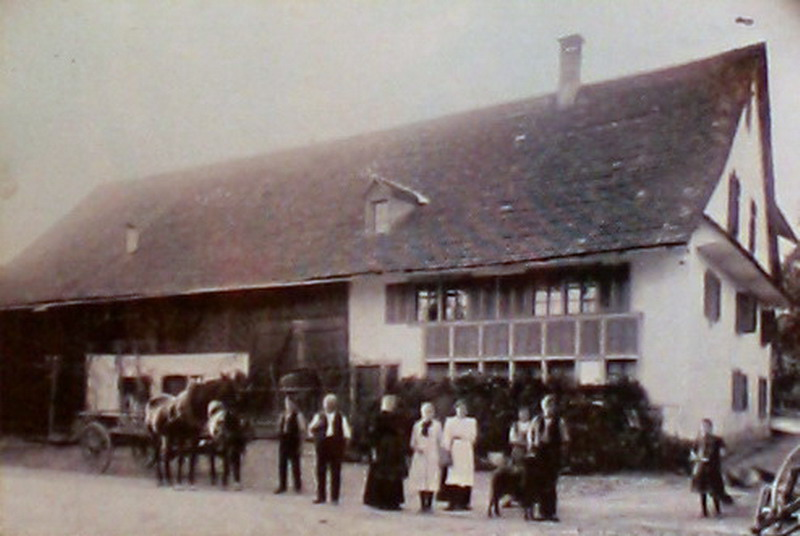 Rüti (ZH) : Historische Fotografie des «Lähenhof» an der Goldbachstrasse 3, ein sogenannter ehemaliger «Rütihof» der Prämonstratenserabtei.